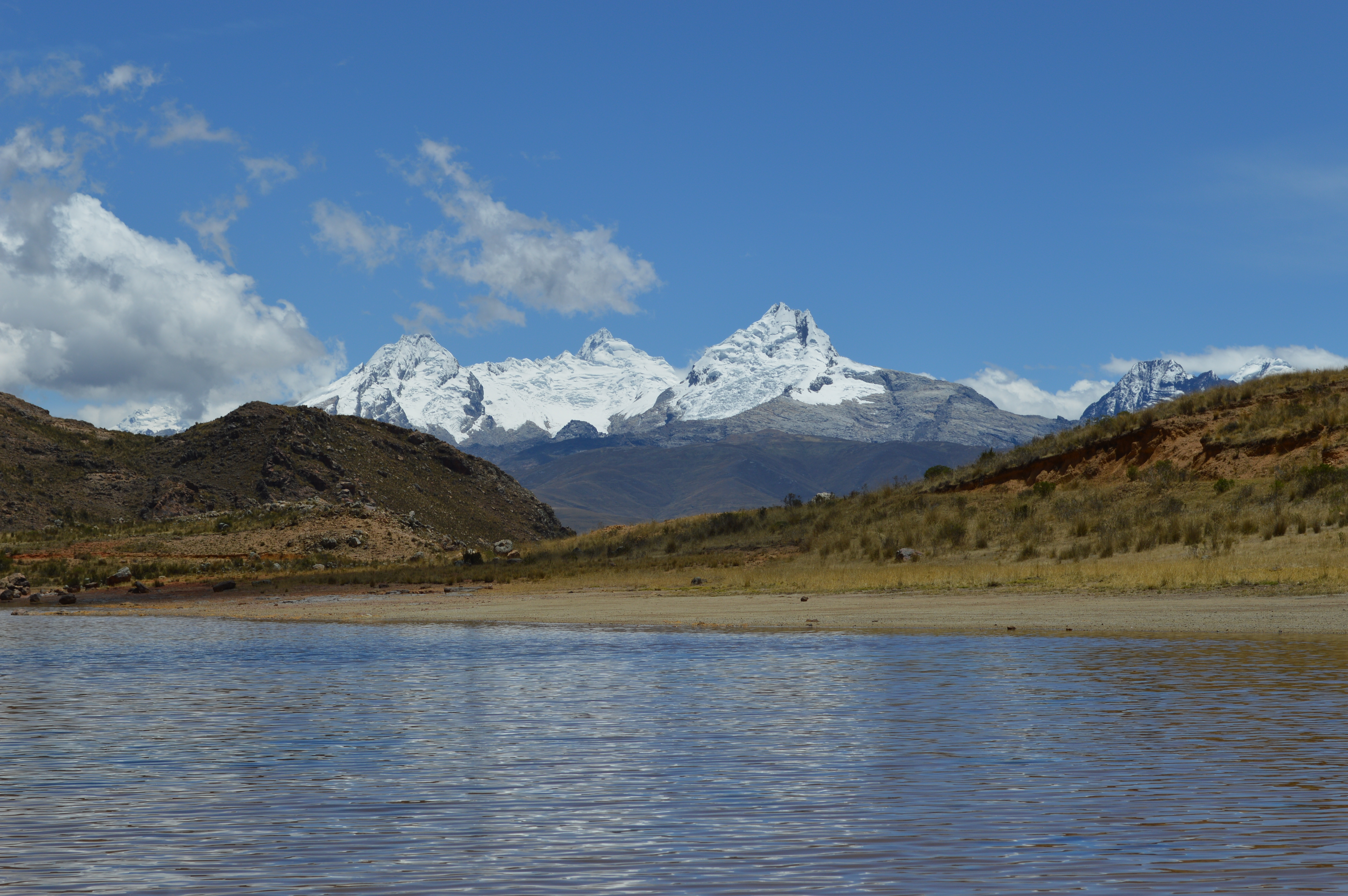 La laguna Antacocha es una laguna en la Cordillera negra. Se ubica dentro del distrito y provincia de Recuay, región Áncash en Perú.